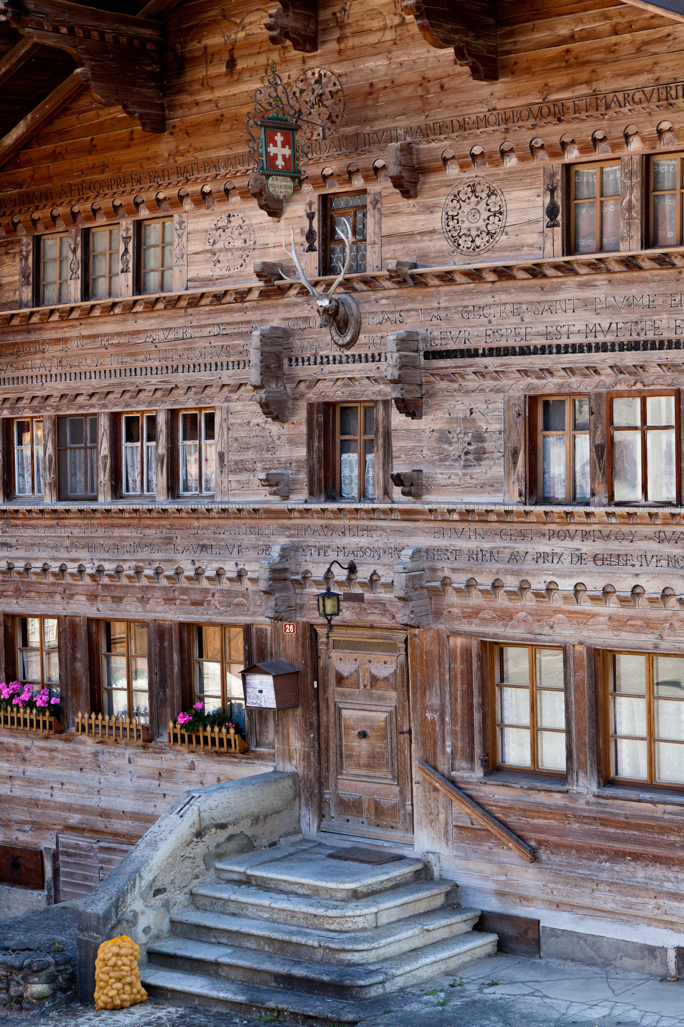 Alte Herberge "Croix-Blanche" in Montbovon (Haut-Intyamon)